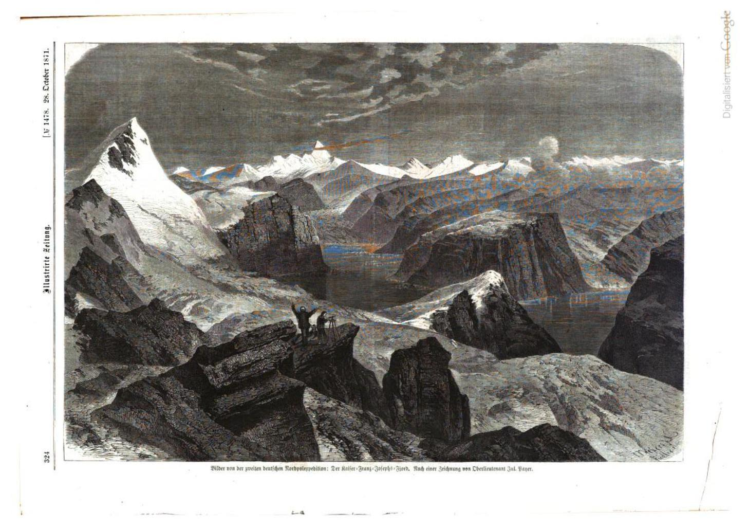 Kaiser-Franz-Josef-Gletscher im Jahr 1870, 2. deutsche Polarexpedition 1869-1870